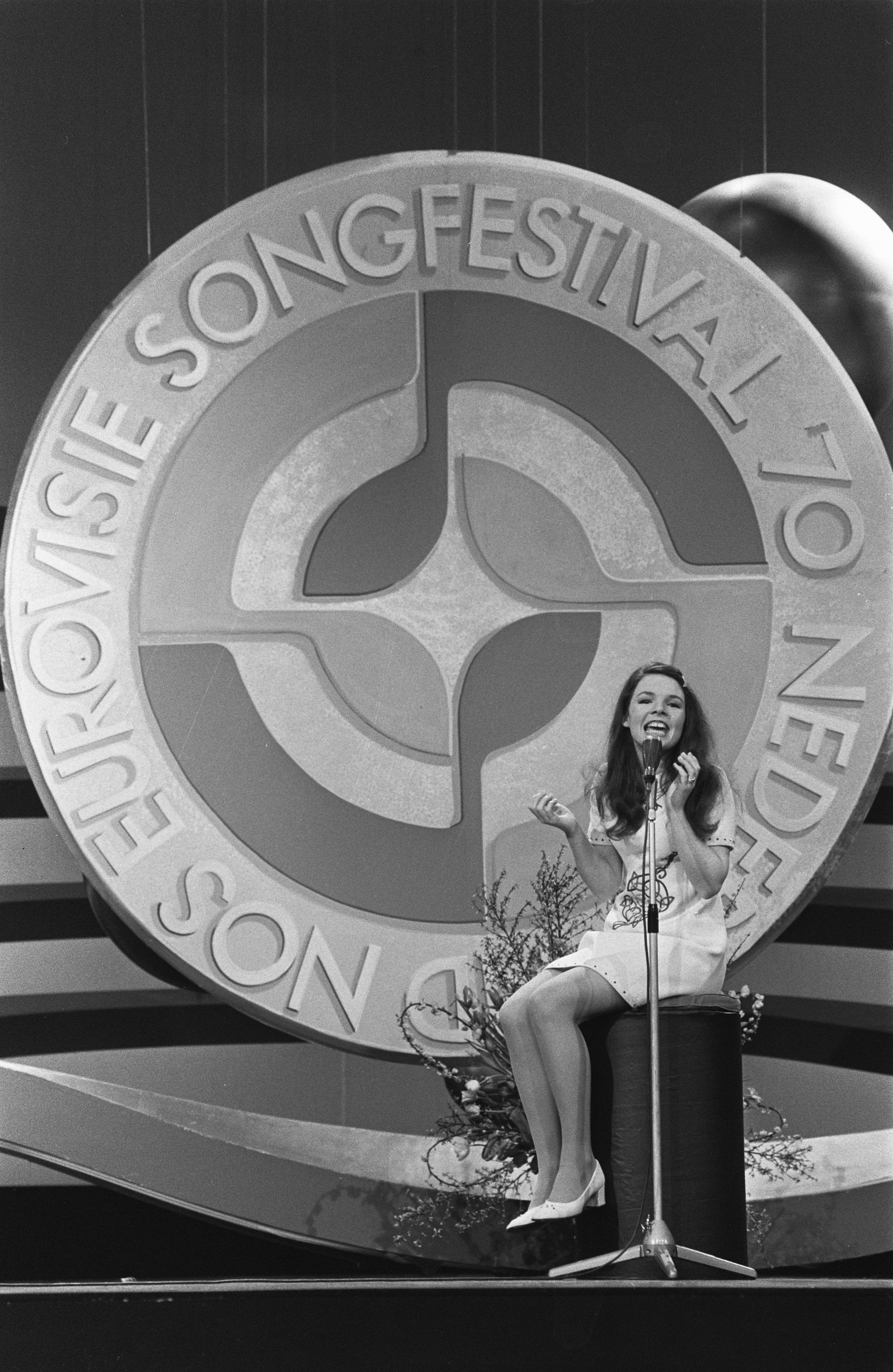 Collectie / Archief : Fotocollectie Anefo Reportage / Serie : Eurovisie Songfestival 1970 in RAI te Amsterdam Beschrijving : Dana (Ierland) Annotatie : De uiteindelijke winnares. Volledige naam: Dana Rosemary Scallon Datum : 21 maart 1970 Locatie : Amsterdam, Noord-Holland Trefwoorden : artiesten, songfestivals, zangers Persoonsnaam : Dana (zangeres) Instellingsnaam : Eurovisie Song Festival Fotograaf : Koch, Eric / Anefo Auteursrechthebbende : Nationaal Archief Materiaalsoort : Negatief (zwart/wit) Nummer archiefinventaris : bekijk toegang 2.24.01.05 Bestanddeelnummer : 923-3694 Reacties Geplaatst door Musiclady op 28 juli 2016 - 10:01. (Ierland) Dana zingt het - winnende - liedje 'All Kinds of Everything'. NB. geboren als Rosemary Brown, vooral bekend onder haar artiestennaam Dana.